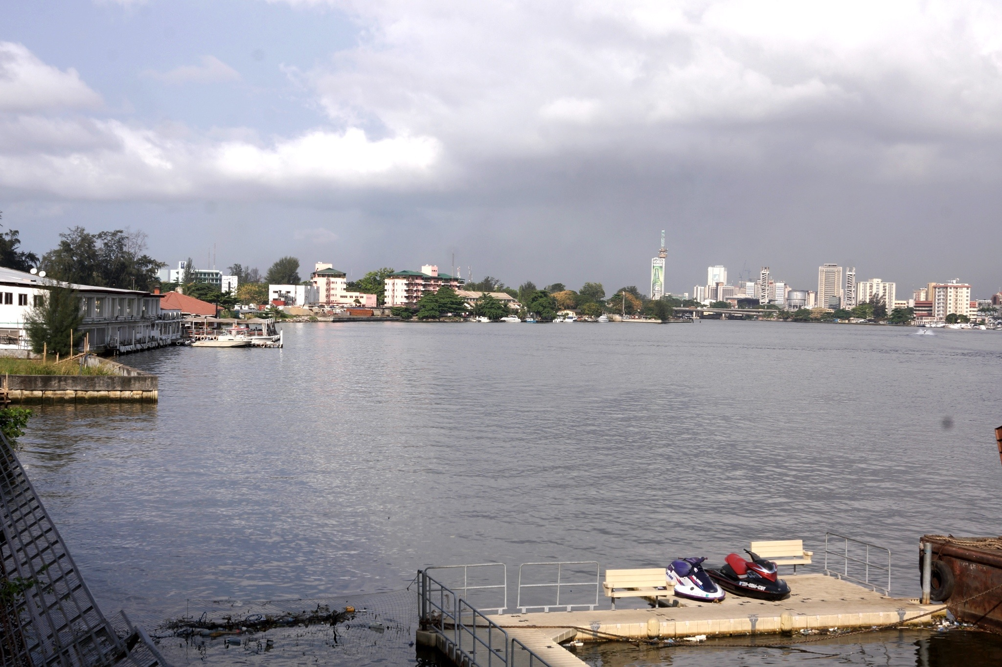 Lagos, Nigeria